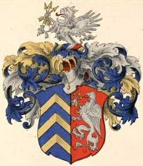 Korbmacheri suguvõsa aadlivapp